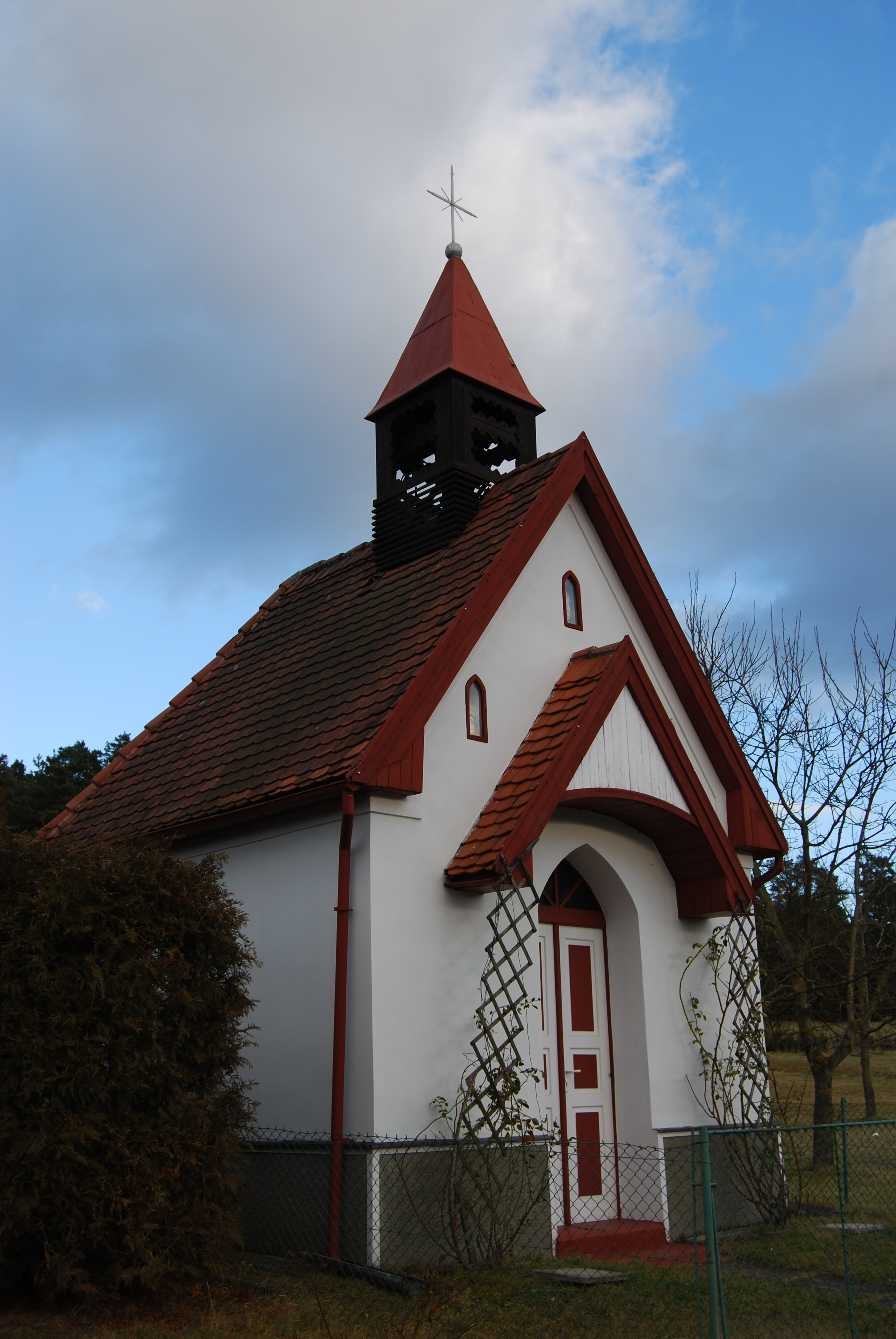 Kaple Nanebevzetí Panny Marie z počátku 20.století v obci. Rastory (Podolí I. ) Okres Písek. Česká republika.